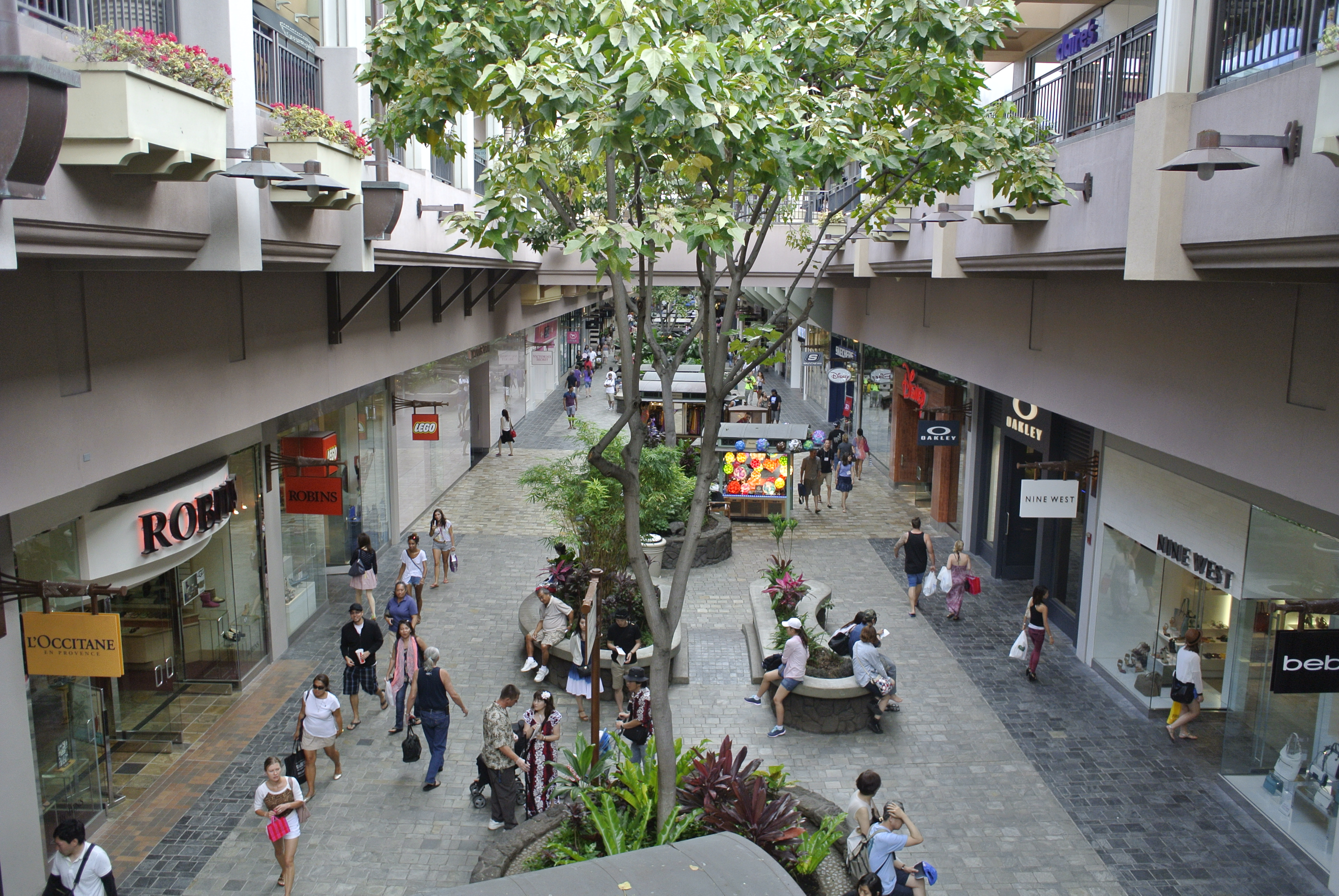 アラモアナショッピングセンター